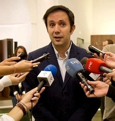 César Ramos en Asamblea de Extremadura